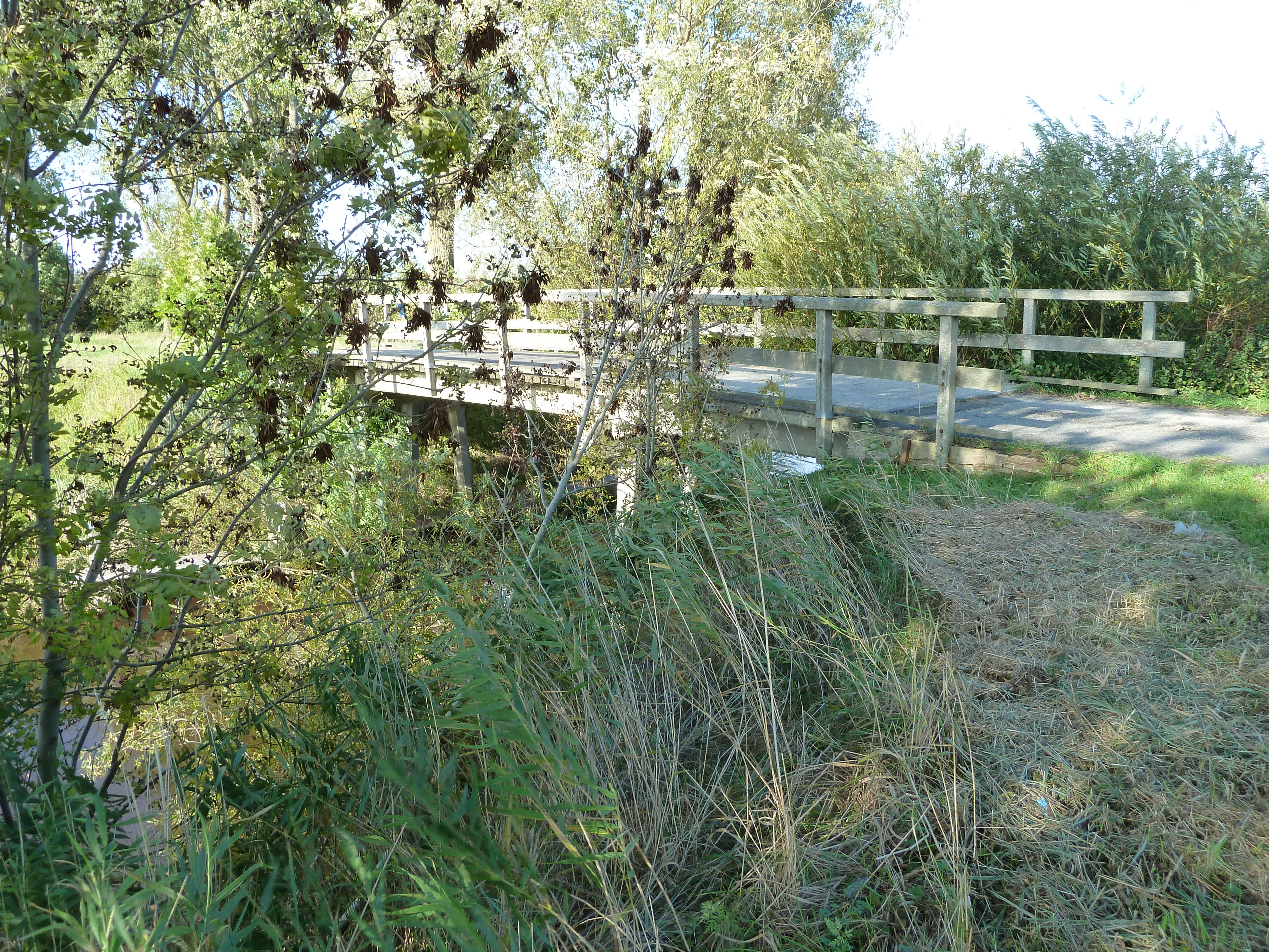 Frouketil bij het gehucht Schifpot in de gemeente Winsum van de Nederlandse provincie Groningen.